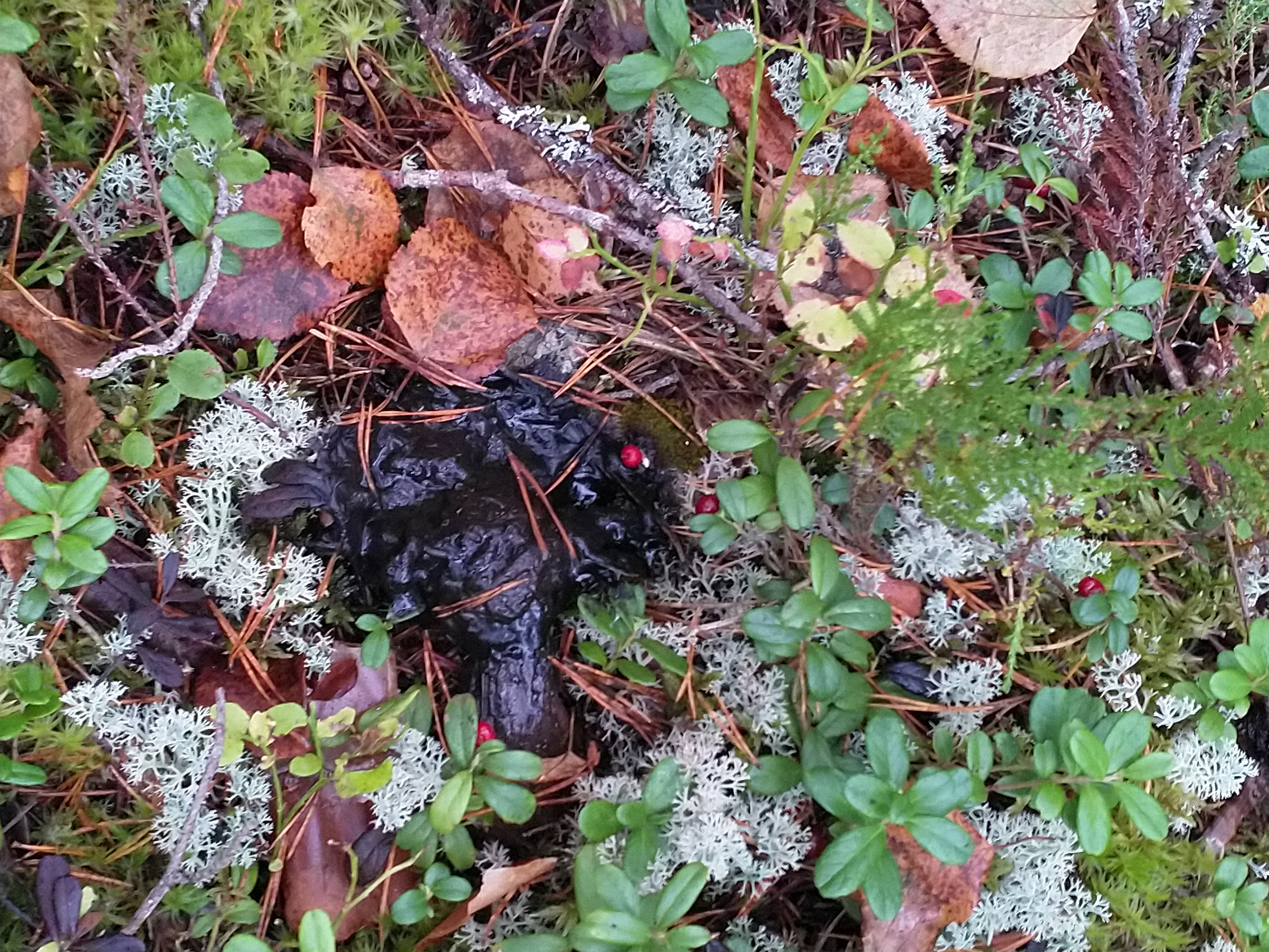 Ilveksen uloste